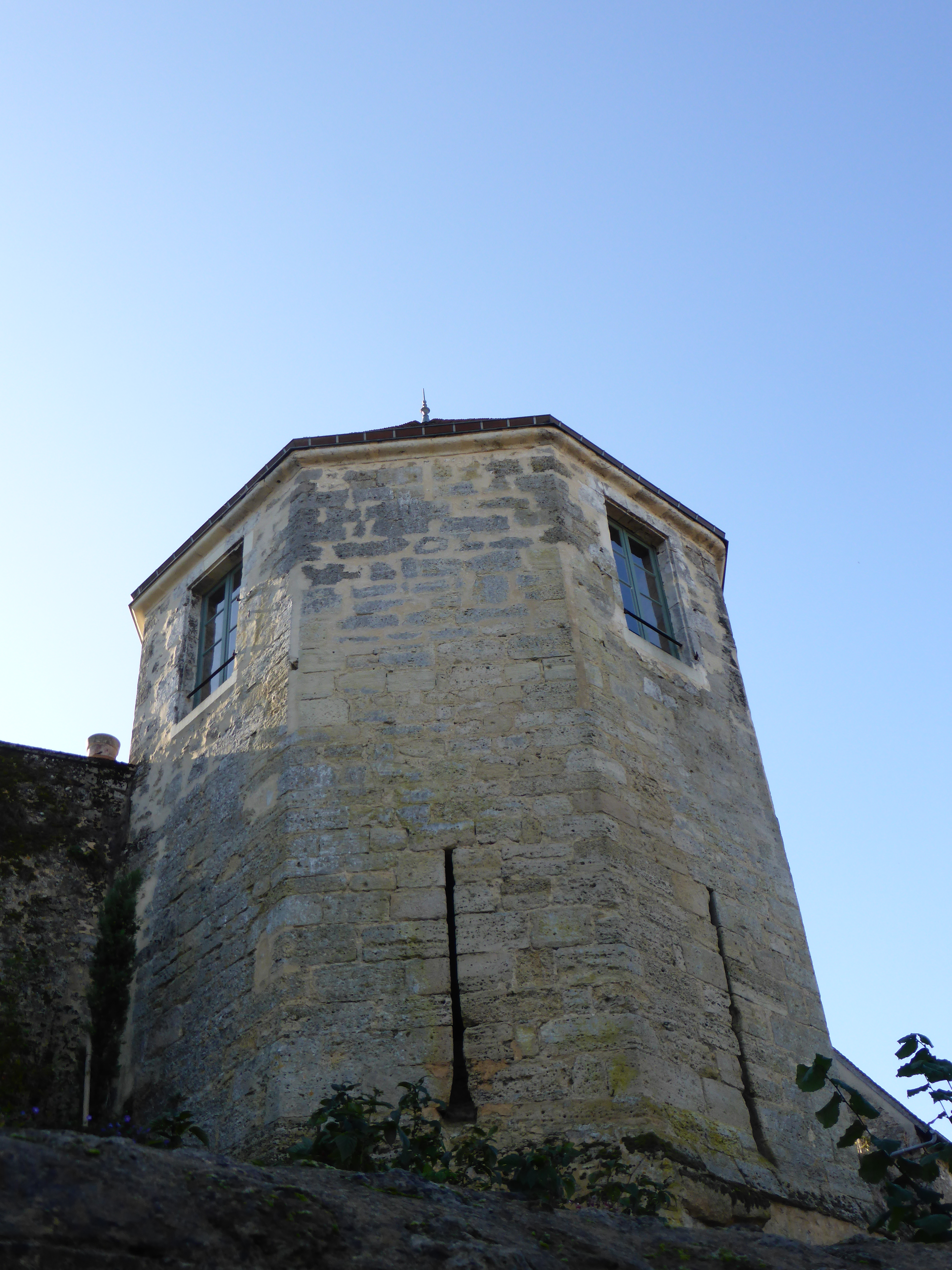 Tour de l'Horloge, à Bellême, dans l'Orne. C'est un vestige des anciens remparts de la ville.